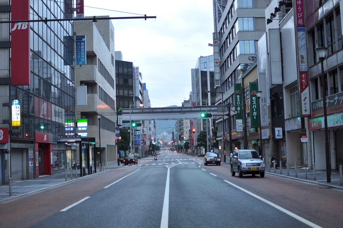 Uomachi